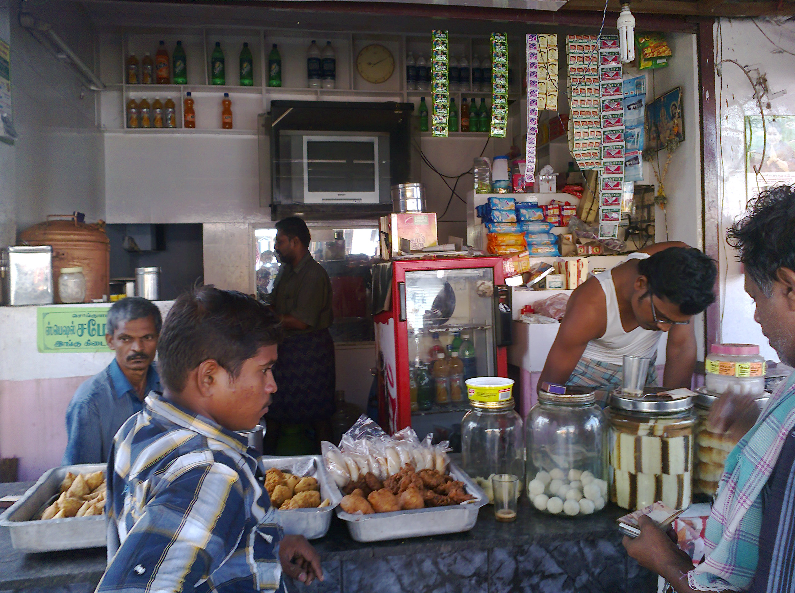 tea shop